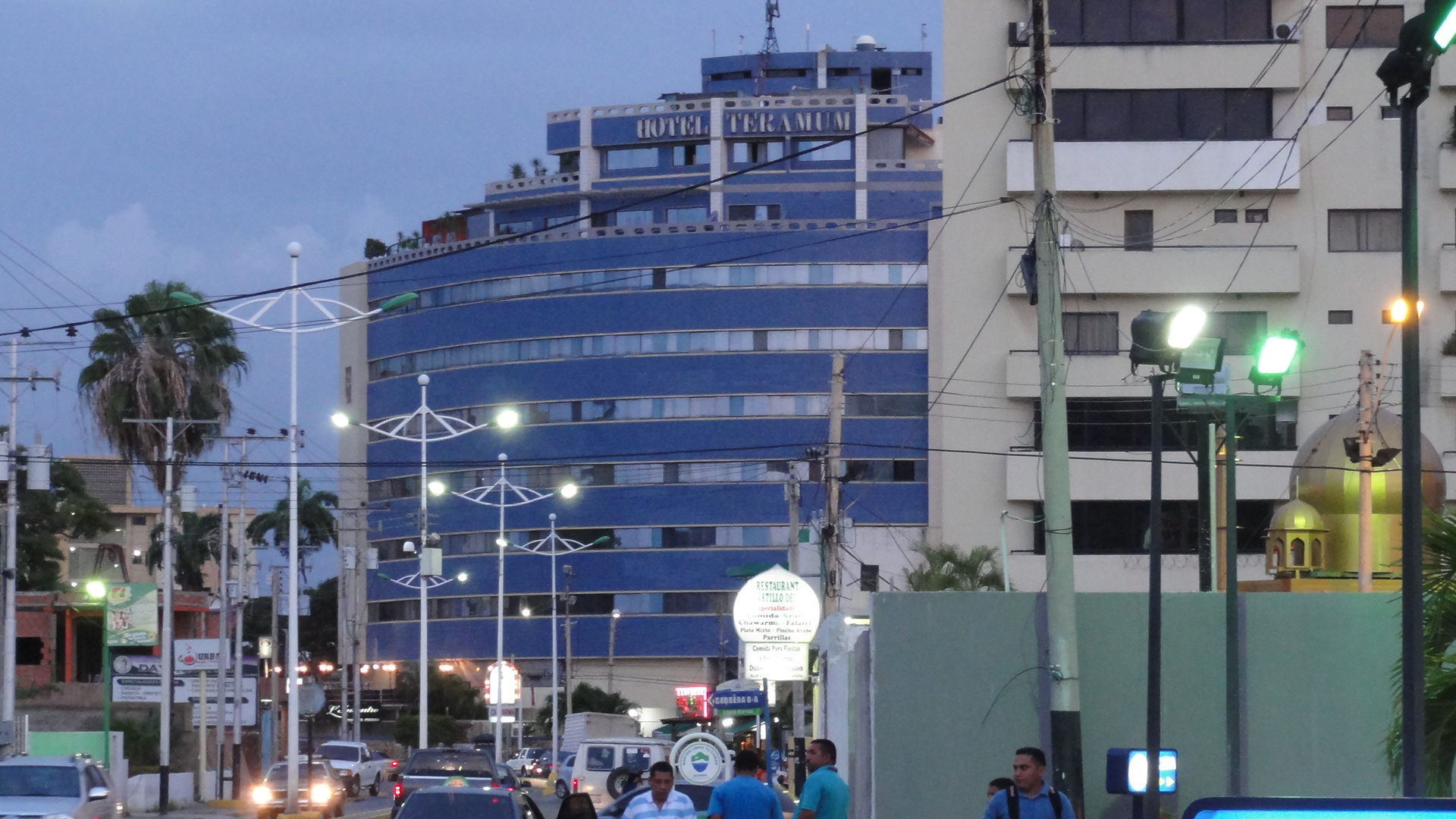 Casco Central, Lechería, Venezuela